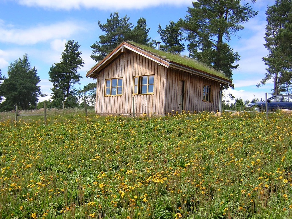 (en) Arnica montana field in Scotland (july 2004) (fr) exemple de culture de Arnica montana en Écosse (juillet 2004). Cette culture est située en Écosse, au nord d'Inverness à environ 150 m d'altitude. Cette culture d'Arnica montana fonctionne sous la forme d'une rotation culturale où pendant quatre années se récoltent quelques dizaines de kilogrammes de capitules secs sur chaque parcelles de 1000m². Cinq parcelles de cette taille ont ainsi un développement échelonné afin de permettre une production de plante entière annuelle d'environ 800 kg frais. Les plants sont cultivés sur des buttées de terre, recouvertes d'une bâche afin de limiter les adventices, avec un espacement d'environ 40 cm. Les plants de culture sont élancés et fins contrairement aux plants sauvages souvent trapus. Les capitules sont récoltés puis séchés, en laissant quelques fleurs pour la récolte des graines. Ces capitules récoltés sont destinés aux laboratoires pharmaceutiques, principalement Weleda.